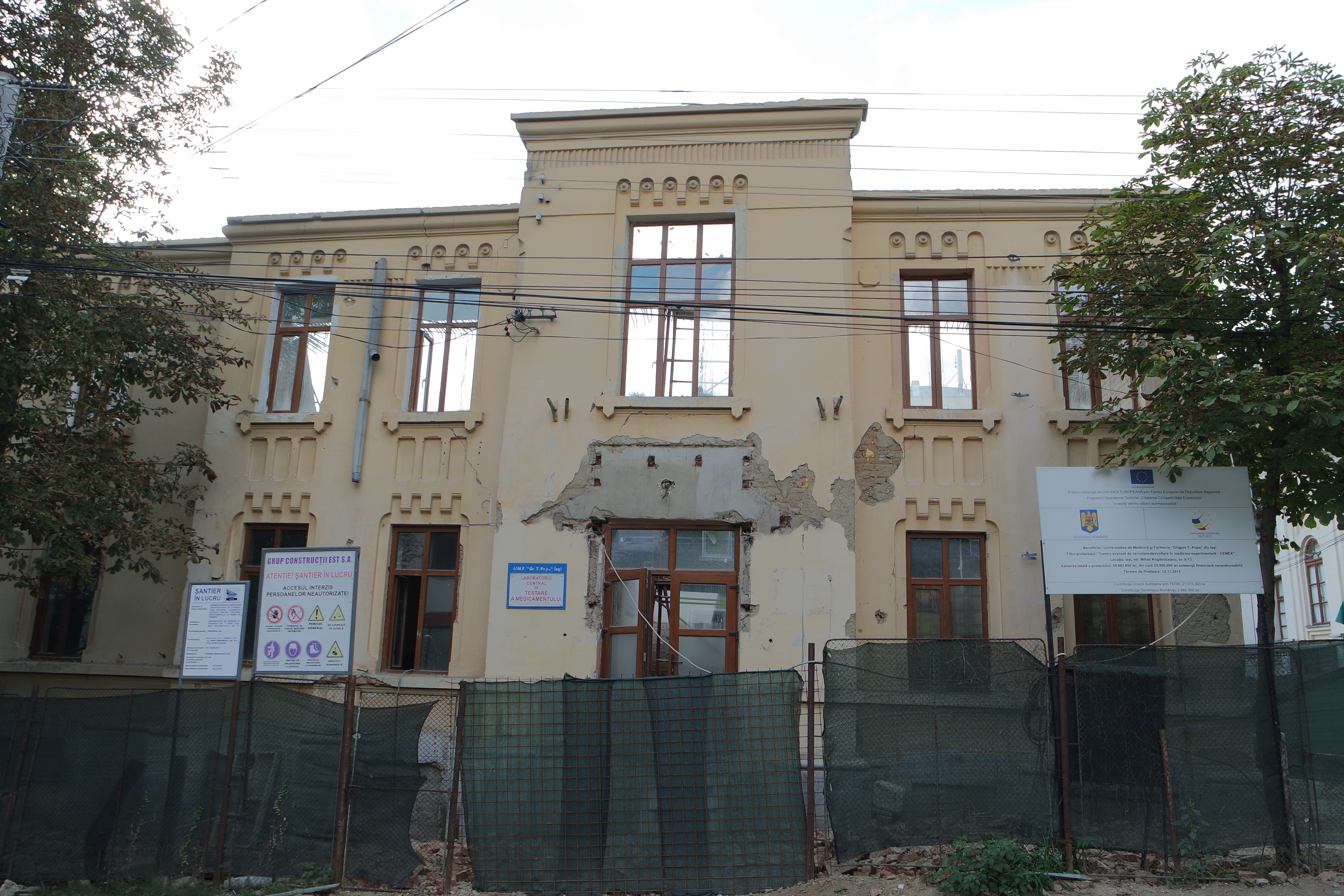 Casa Alexandru Philippide, azi Laboratorul de testare a medicamentelor - in curs de renovare - 26.09.2015